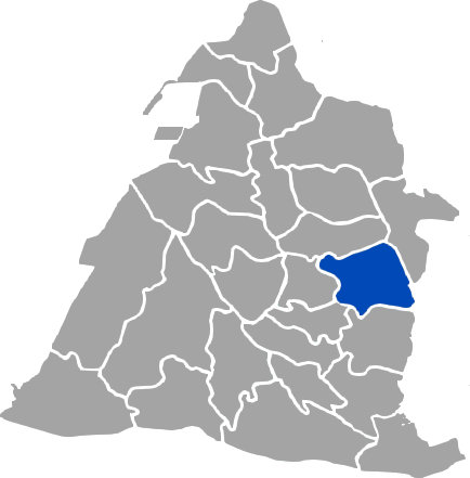 臺灣省彰化縣員林鎮地圖。